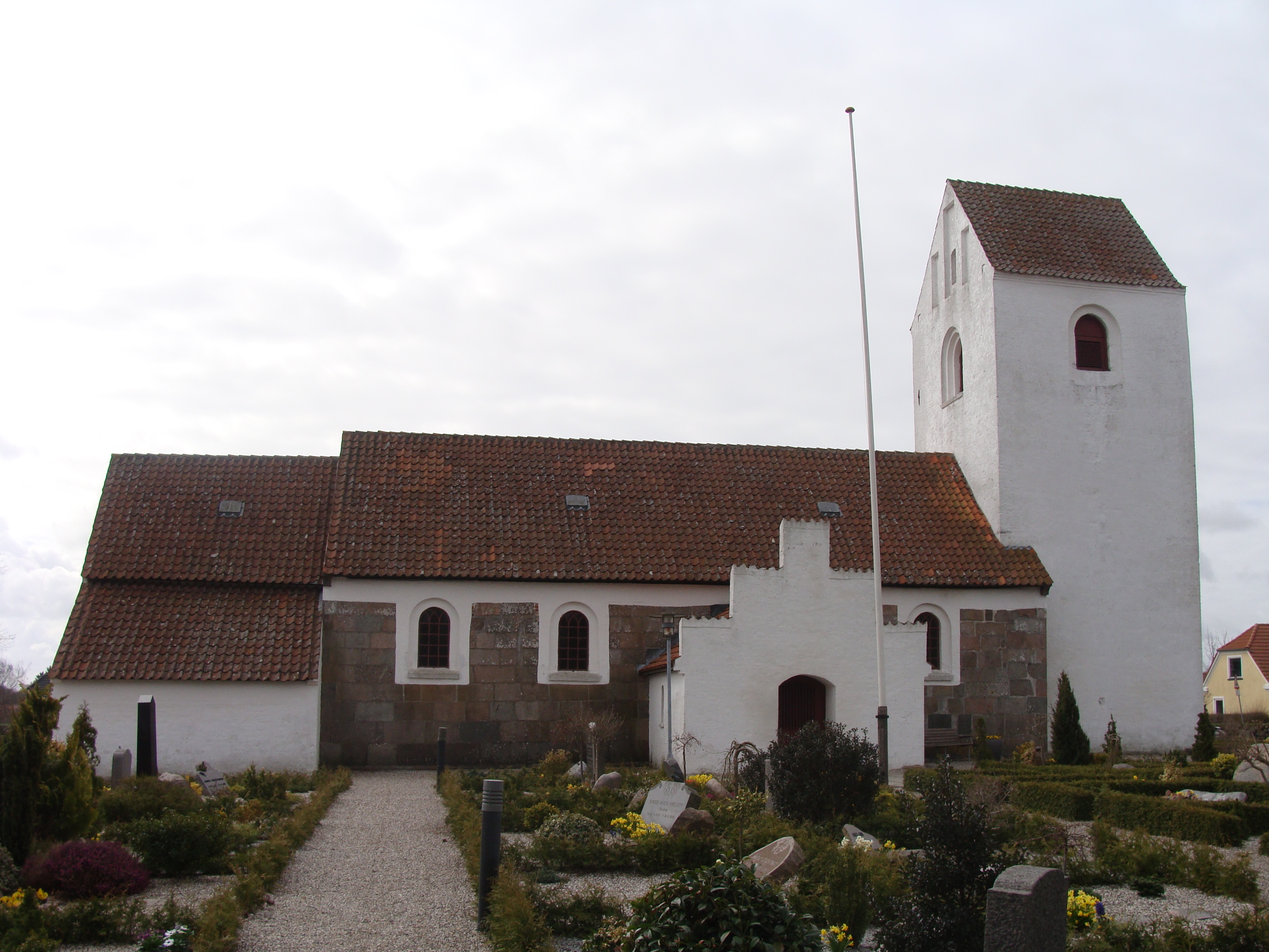 Farstrup Kirke